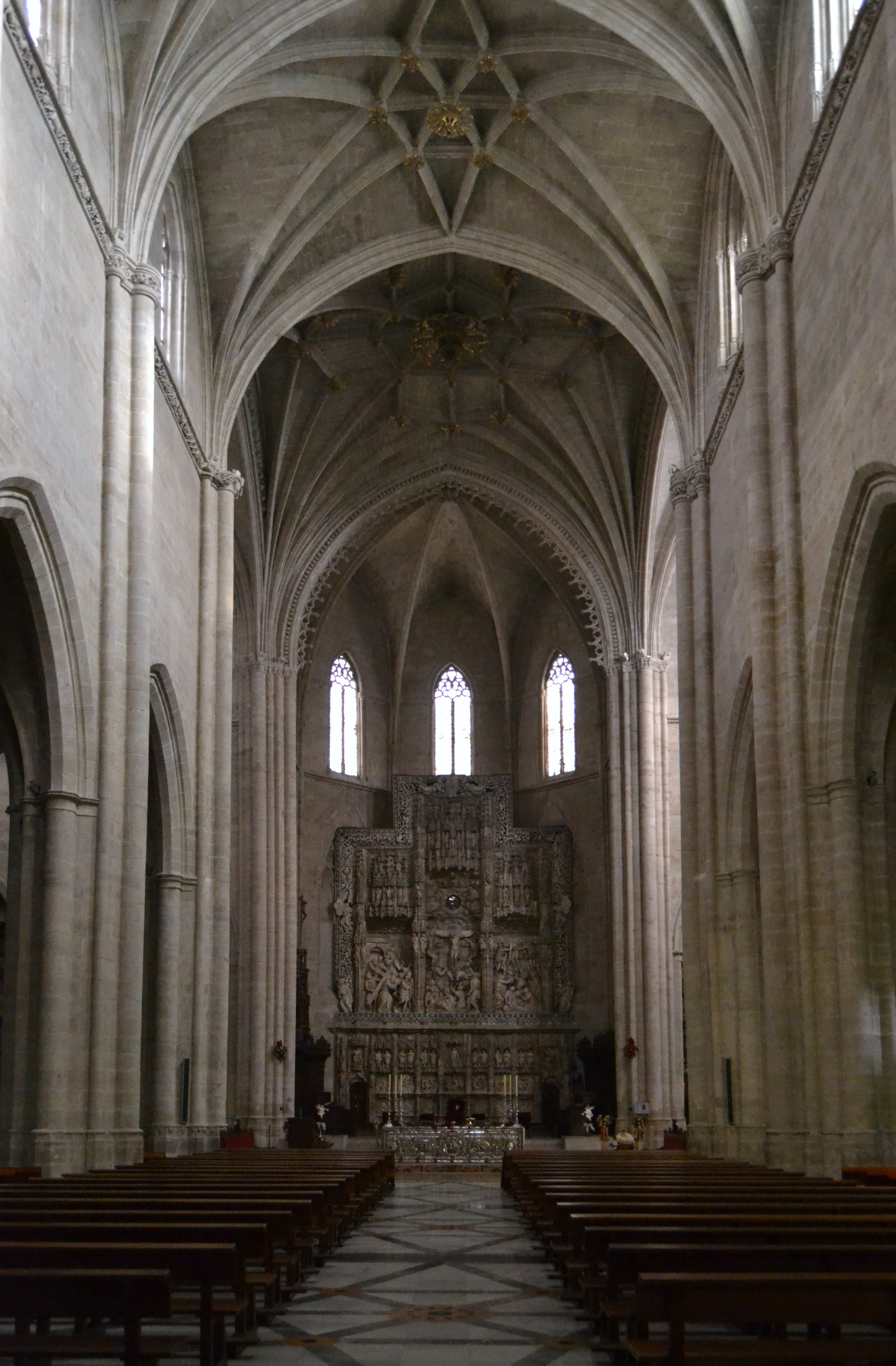 Seu de Santa María de Uesca, interior.